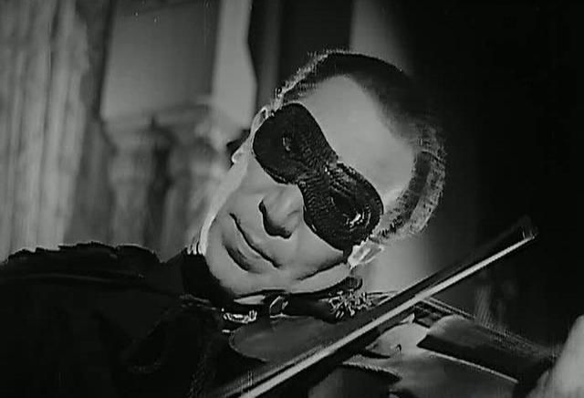 يوسف وهبي في مشهد من فيلم غرام وانتقام الذي أدى فيه دور ملحن